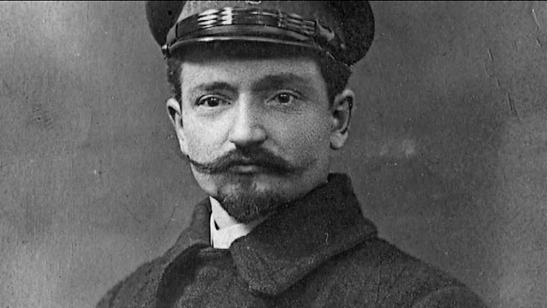 Eugène Lelouvier (1873-1937), vers 1900. Photographe inconnu.